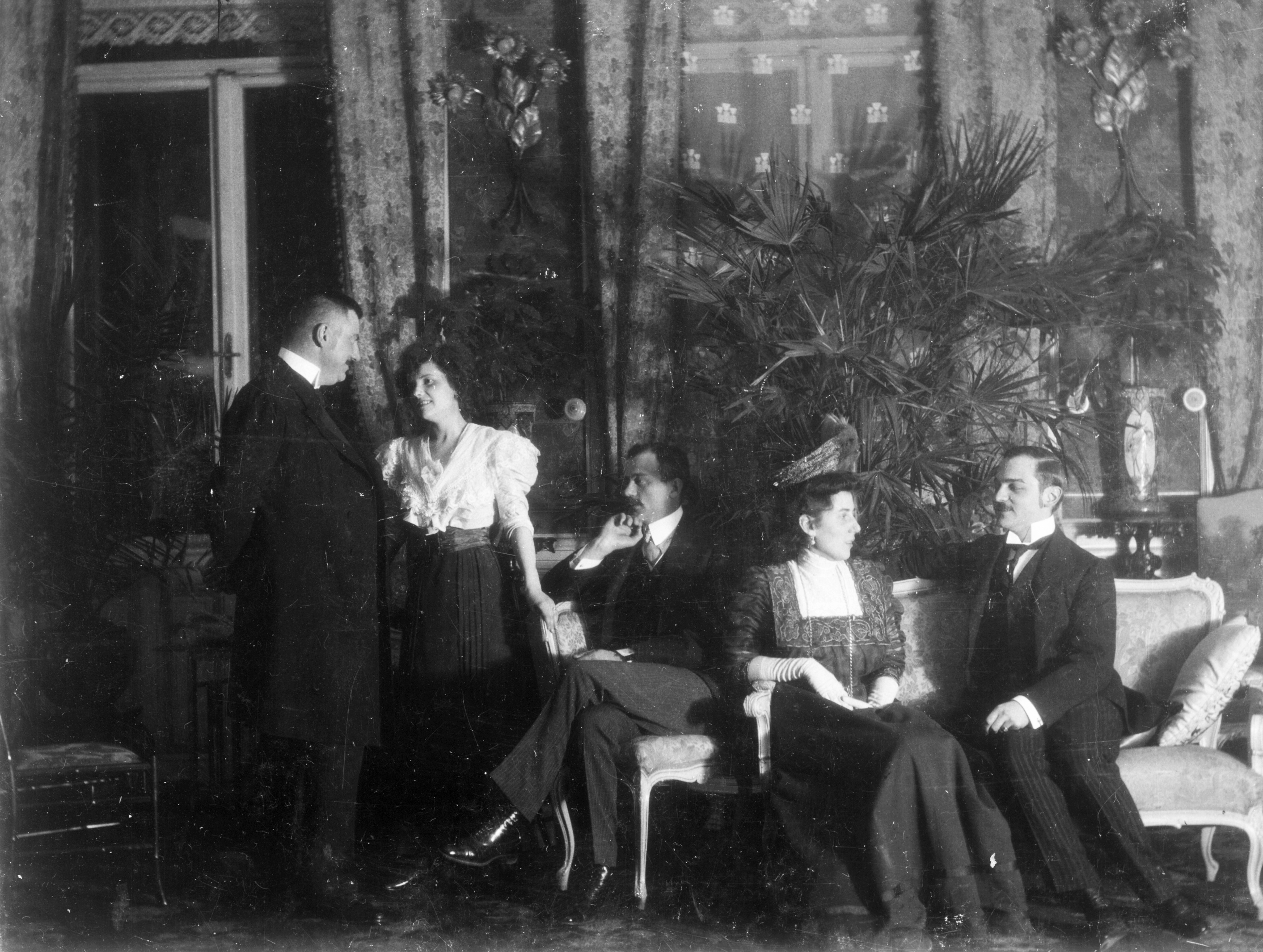 Reviczky utca 3., műkedvelő előadás Berczik Árpád író lakásán. Jobbról a második Visy Masa. Location: Hungary, Budapest VIII. Tags: play Title: Reviczky utca 3., műkedvelő előadás Berczik Árpád író lakásán. Jobbról a második Visy Masa.